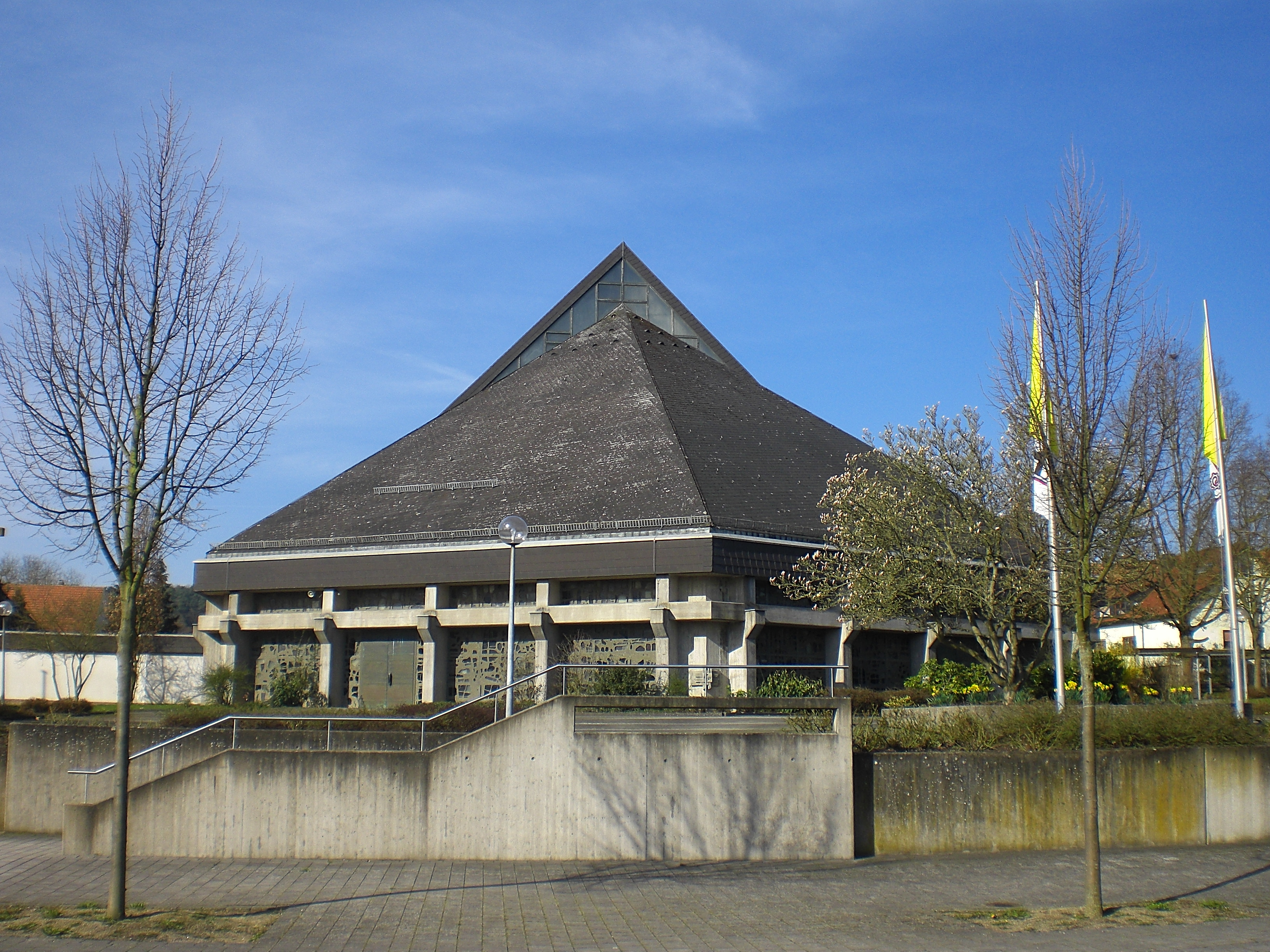 Ansicht der Heilig-Kreuz-Kirche, Maberzell